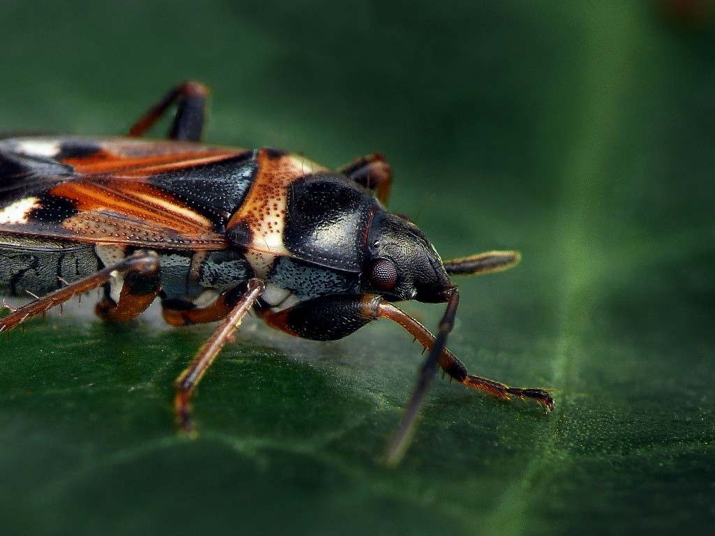 Raglius alboacuminatus detail